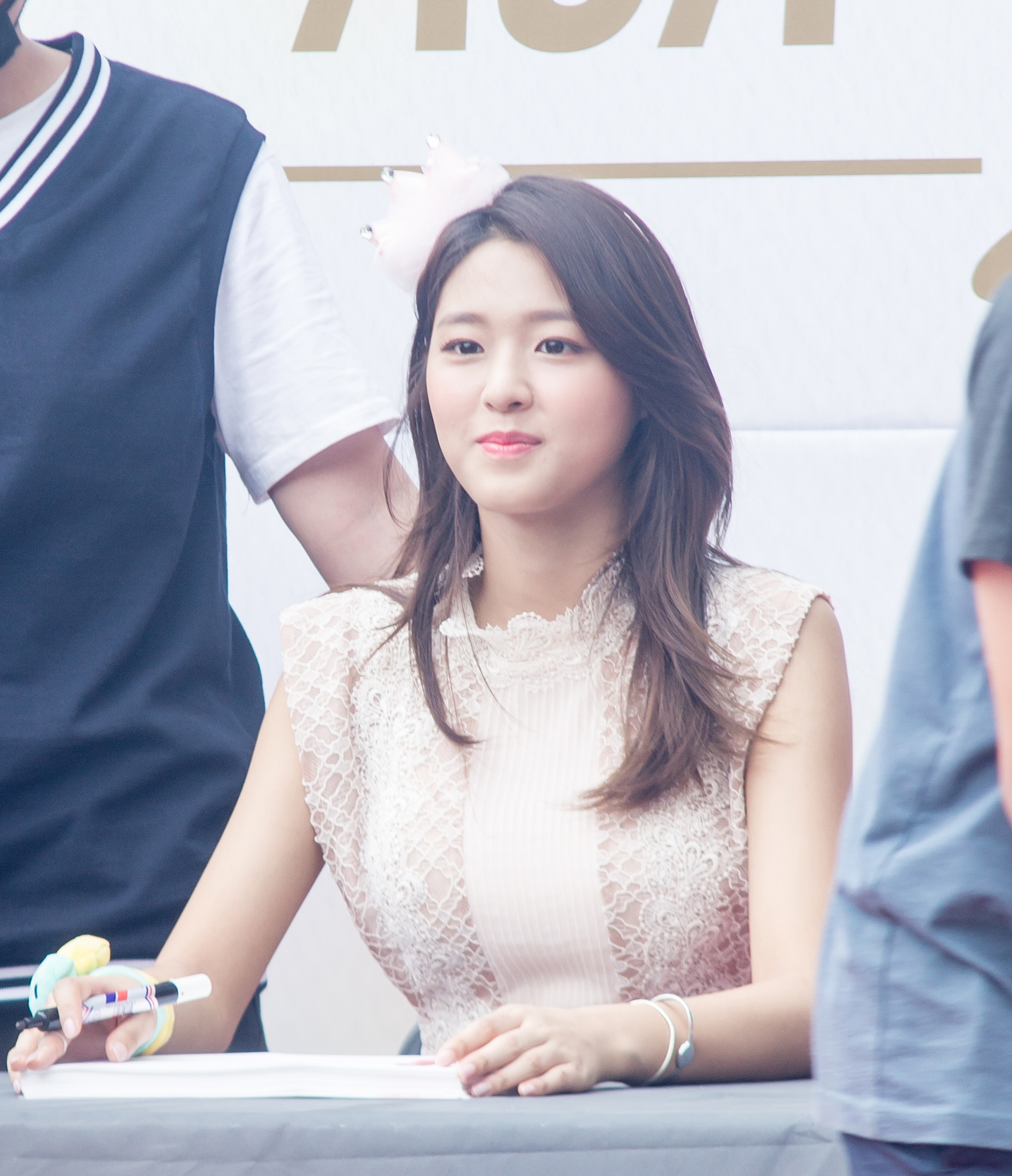 160911 동탄 엔터식스 설현 팬싸인회